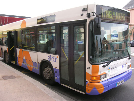 Réseau de bus de la STAR à Roanne